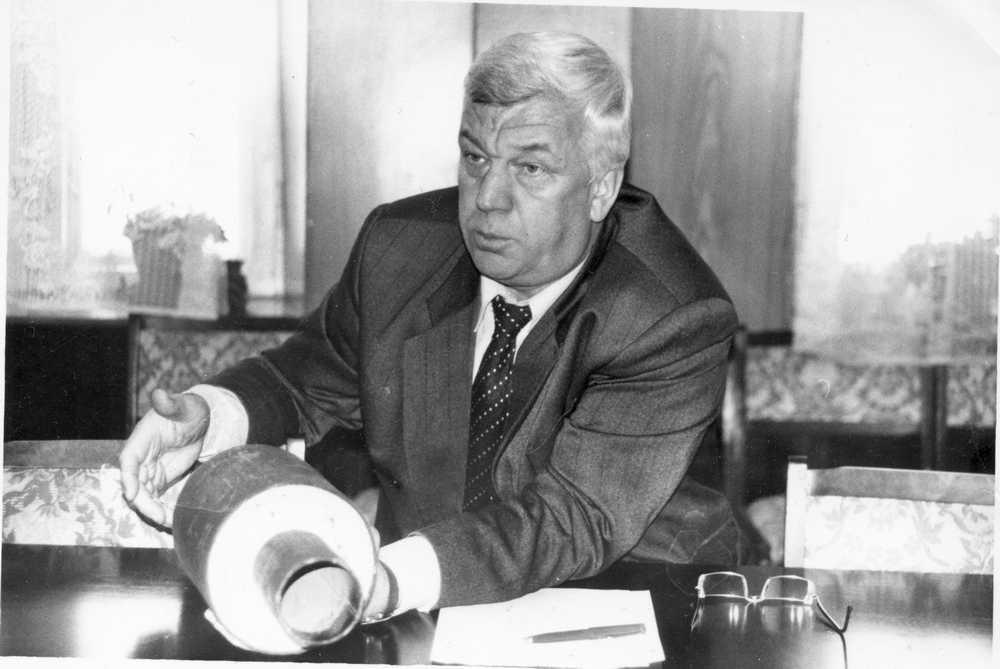 Виктор Михайлович Горшков (директор муниципального предприятия «Жилищно-коммунальное хозяйство») показывает образец новой трубы с пенополистирольным теплоизоляционным покрытием. Переславль, улица Свободы, дом 98.